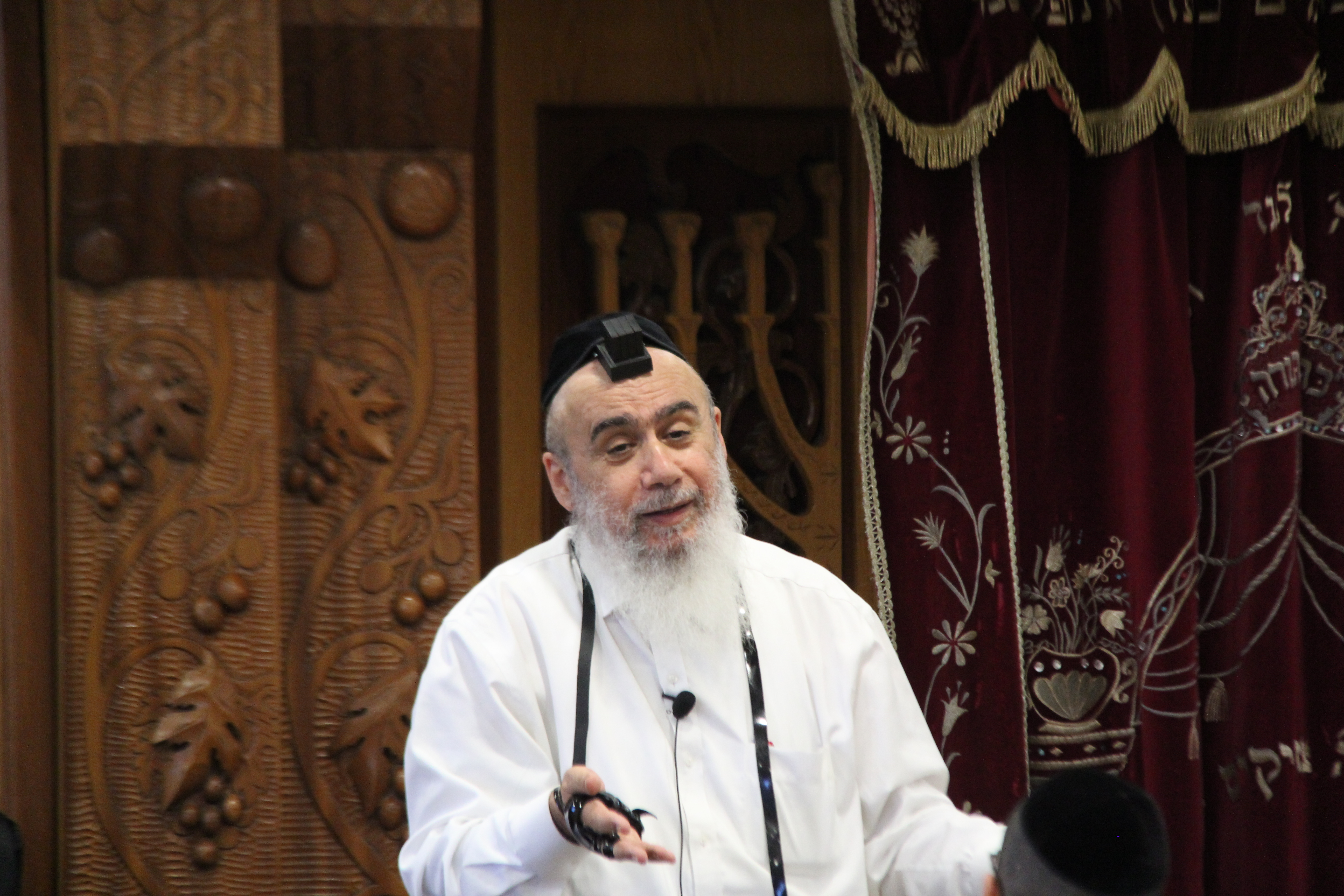 במסירת שיעור לאברכים